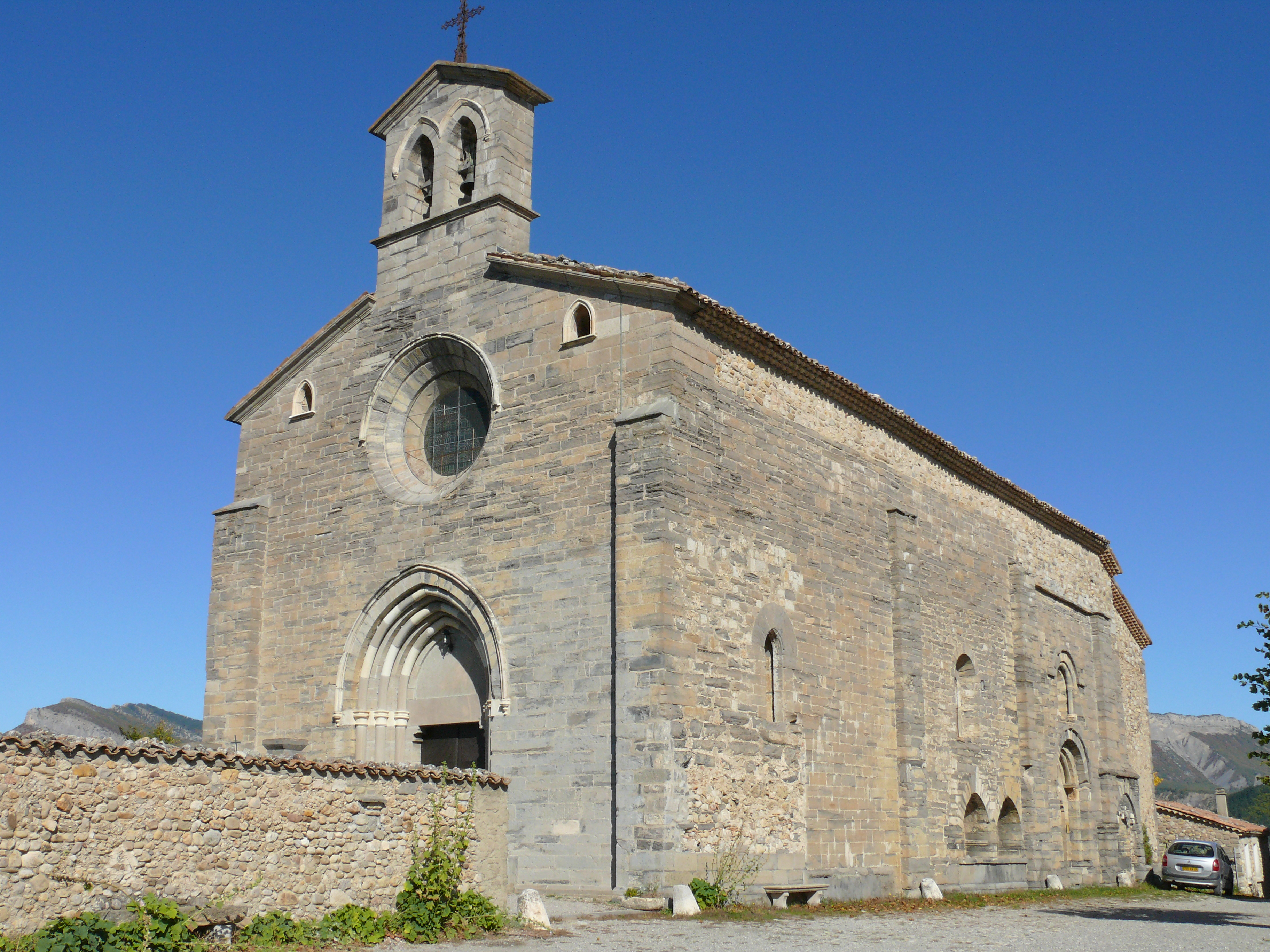 Lagrand - Eglise - Ensemble